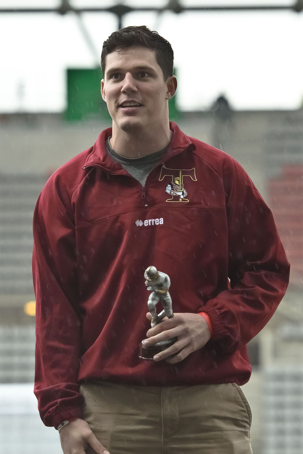 Sean Shelton (quaterback, Templiers d'Élancourt), vainqueur du Trophée Chris Flynn (meilleur joueur étranger) du championnat de France de football américain 2014.